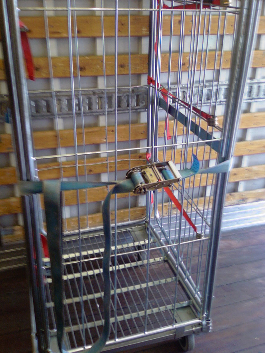 Spanband